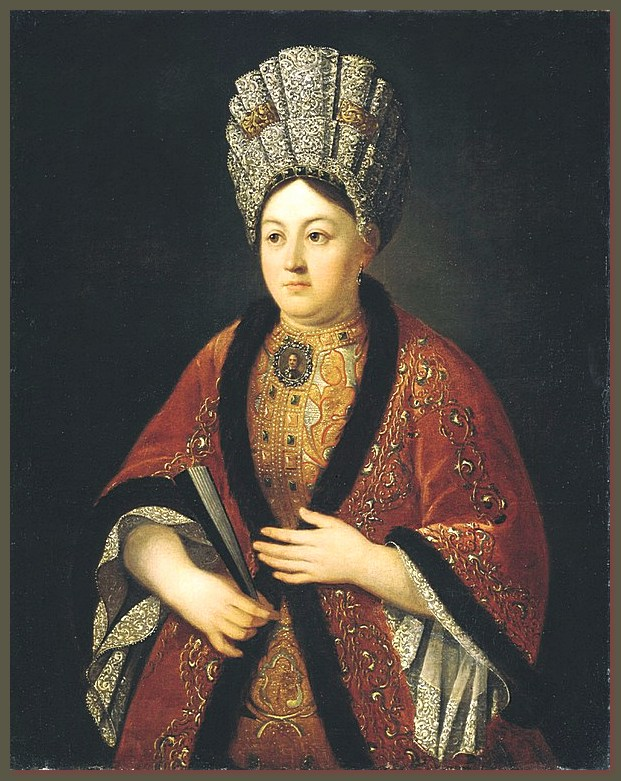 Р. Н. Никитин. Портрет баронессы Марьи Яковлевны Строгановой. Между 1721 и 1724 Единственный портрет, единодушно приписываемый исследователями творчеству Романа Никитина – младшего брата знаменитого живописца Ивана Никитина (вместе с которым художник обучался во Флорентийской Академии художеств у Т. Реди). . Строганова Мария Яковлевна, рожденная Новосильцева, баронесса (1678–1734) – вторая жена солепромышленника, «именитого человека» Г.Д. Строганова; статс-дама Екатерины I и Анны Иоанновны; мать Александра, Николая и Сергея Григорьевичей Строгановых. Изображена с жалованным миниатюрным портретом Петра I.